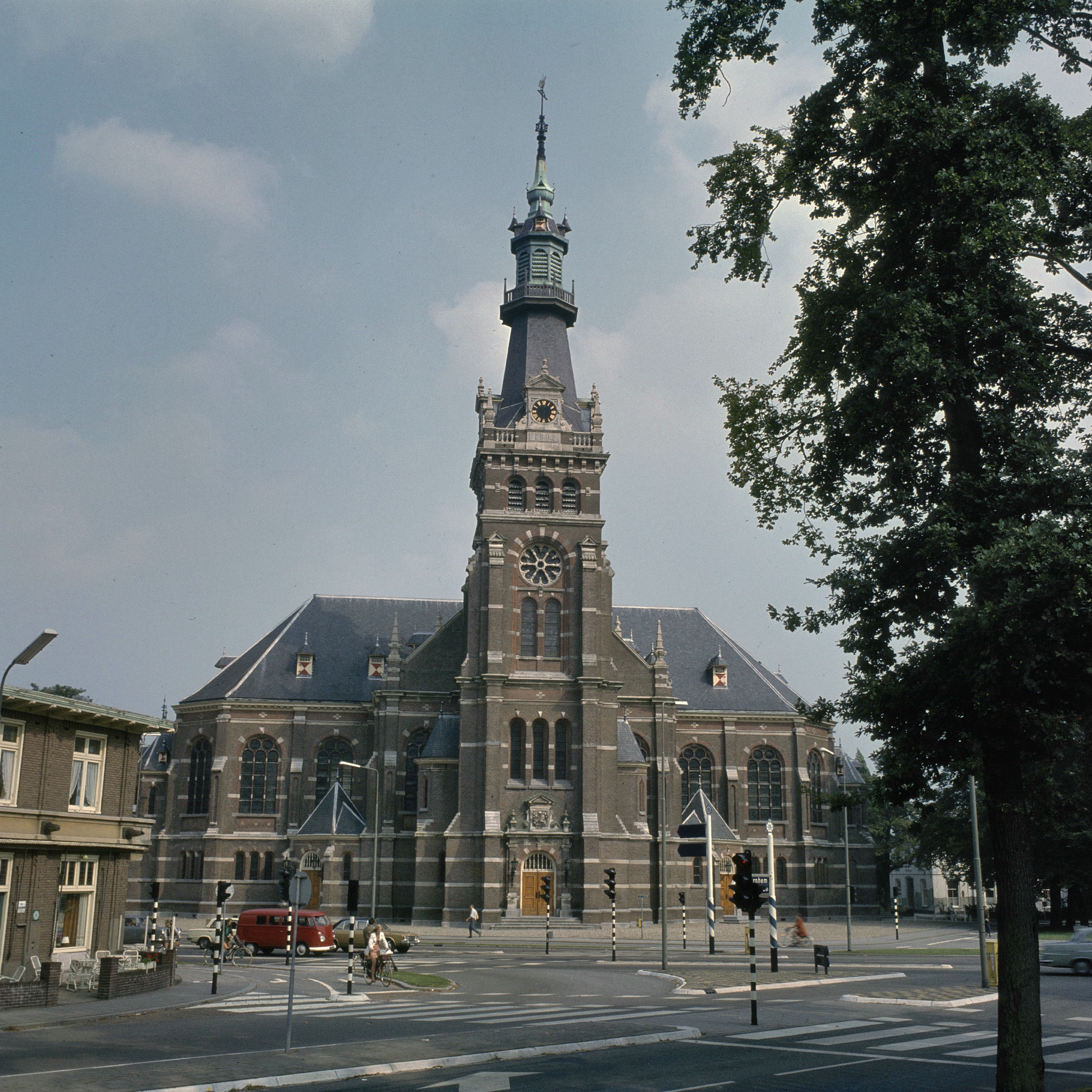 voormalige Hervormde Grote Kerk: Overzicht voorzijde kerk (opmerking: Gefotografeerd voor: De 19de-eeuwse kerkelijke bouwkunst in Nederland, drs. H.P.R. Rosenburg)